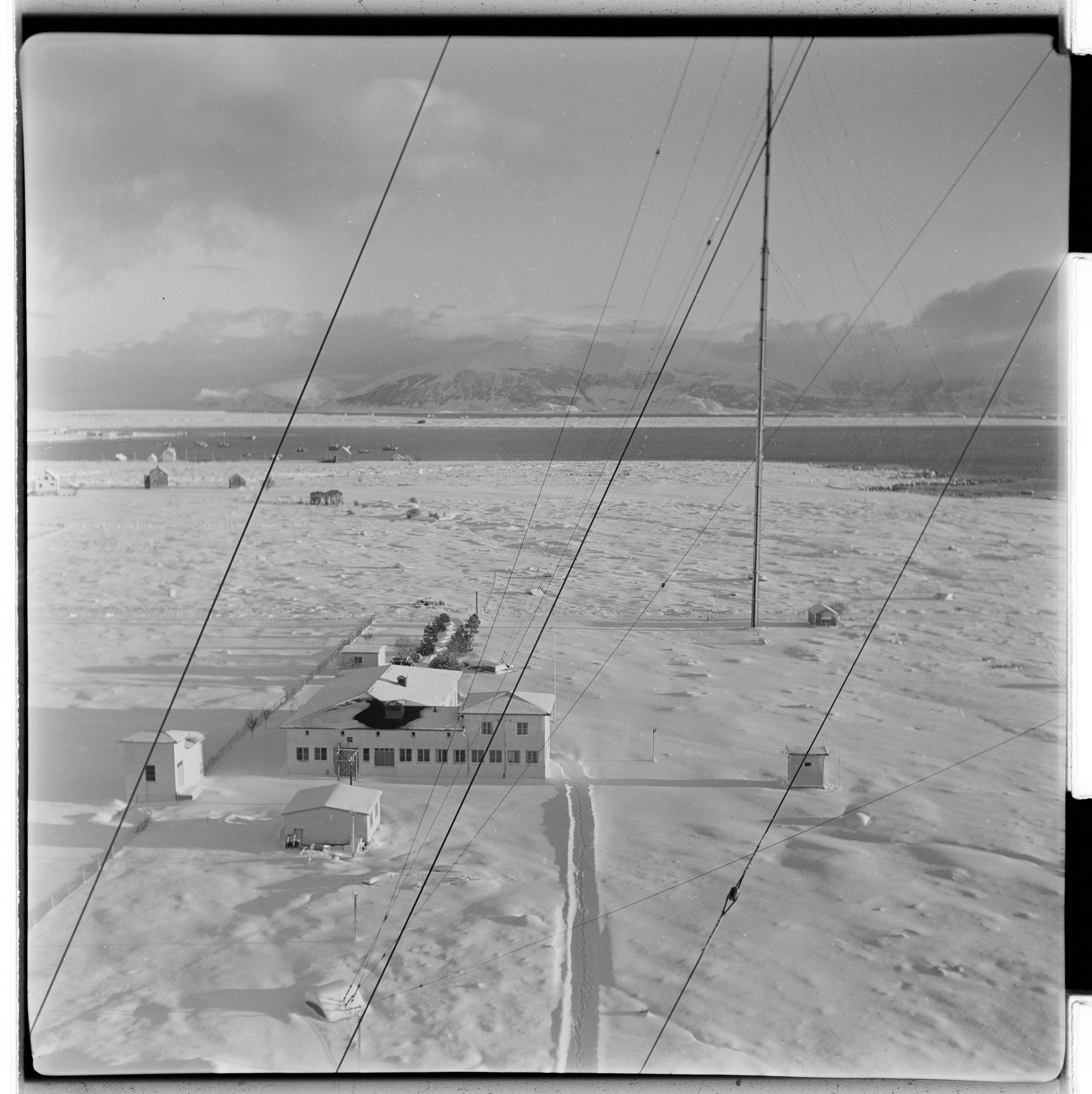 Bildet er hentet fra Arkivverket. Vigra kringkaster, en radiosender for kringkasting på mellombølge på øya Vigra i Møre- og Romsdal. Arkivinstitusjon : Riksarkivet Arkivnavn : Billedbladet NÅ Sted : Norge, Møre og Romsdal, Giske, Emneord: Norkring, NRK, Vigra Kringkaster, Radiosender, Vigra, Antennemast, Kringkasting Avbildet